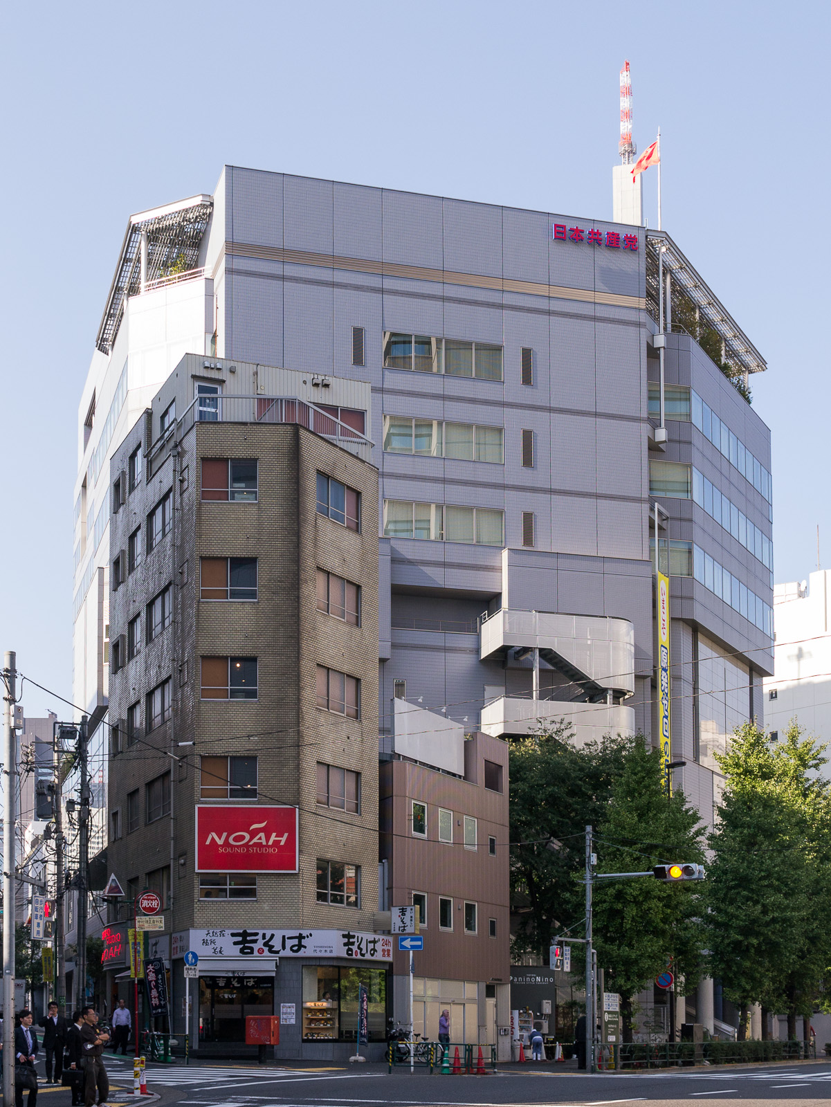 日本共産党中央委員会ビル、東京都渋谷区代々木。